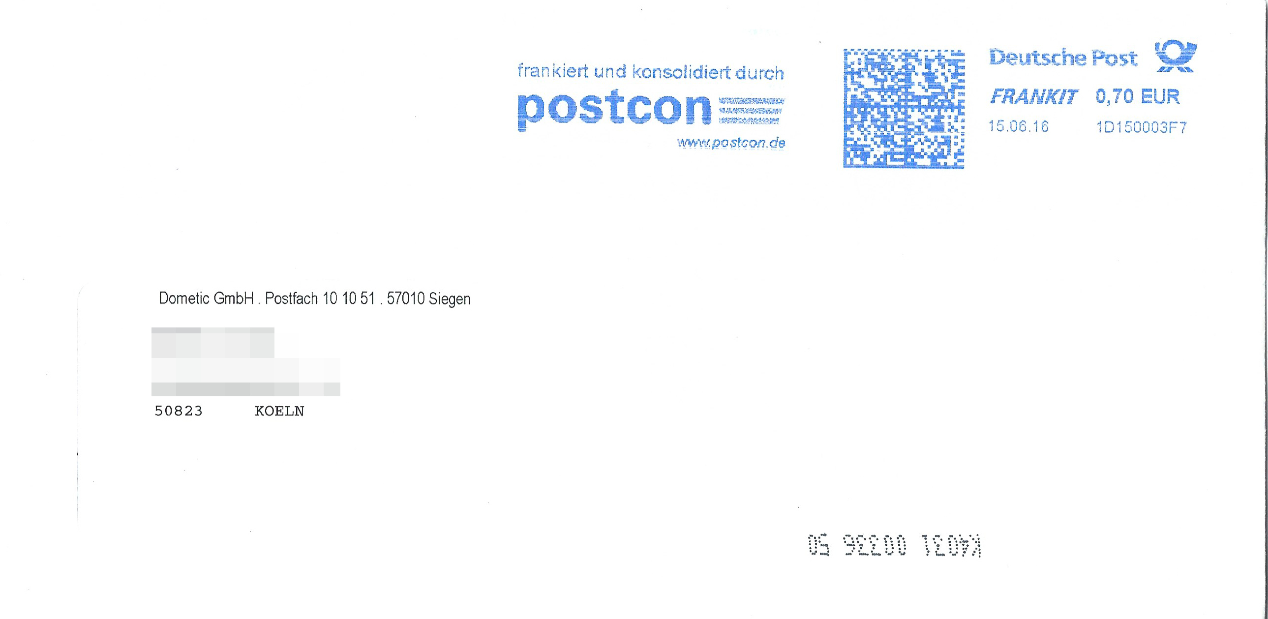 Briefumschlag, Frankit-Freimachung durch den Briefdienstleister postcon, Versand durch die Deutsche Post